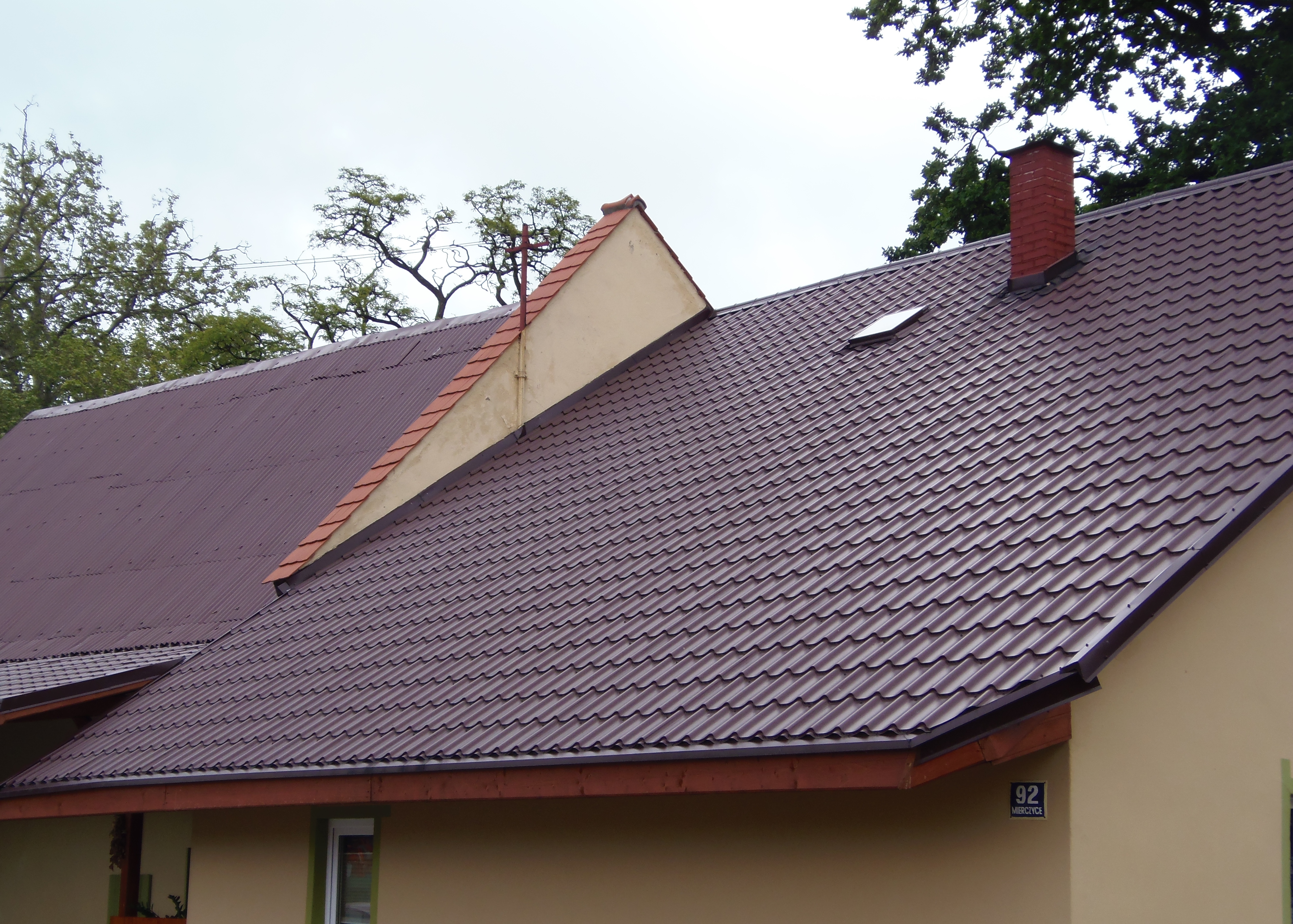 Fotografia przedstawiająca ścianę ogniową, częściej nazywaną ogniomurem. Tu: oddziela dom mieszkalny od magazynu.